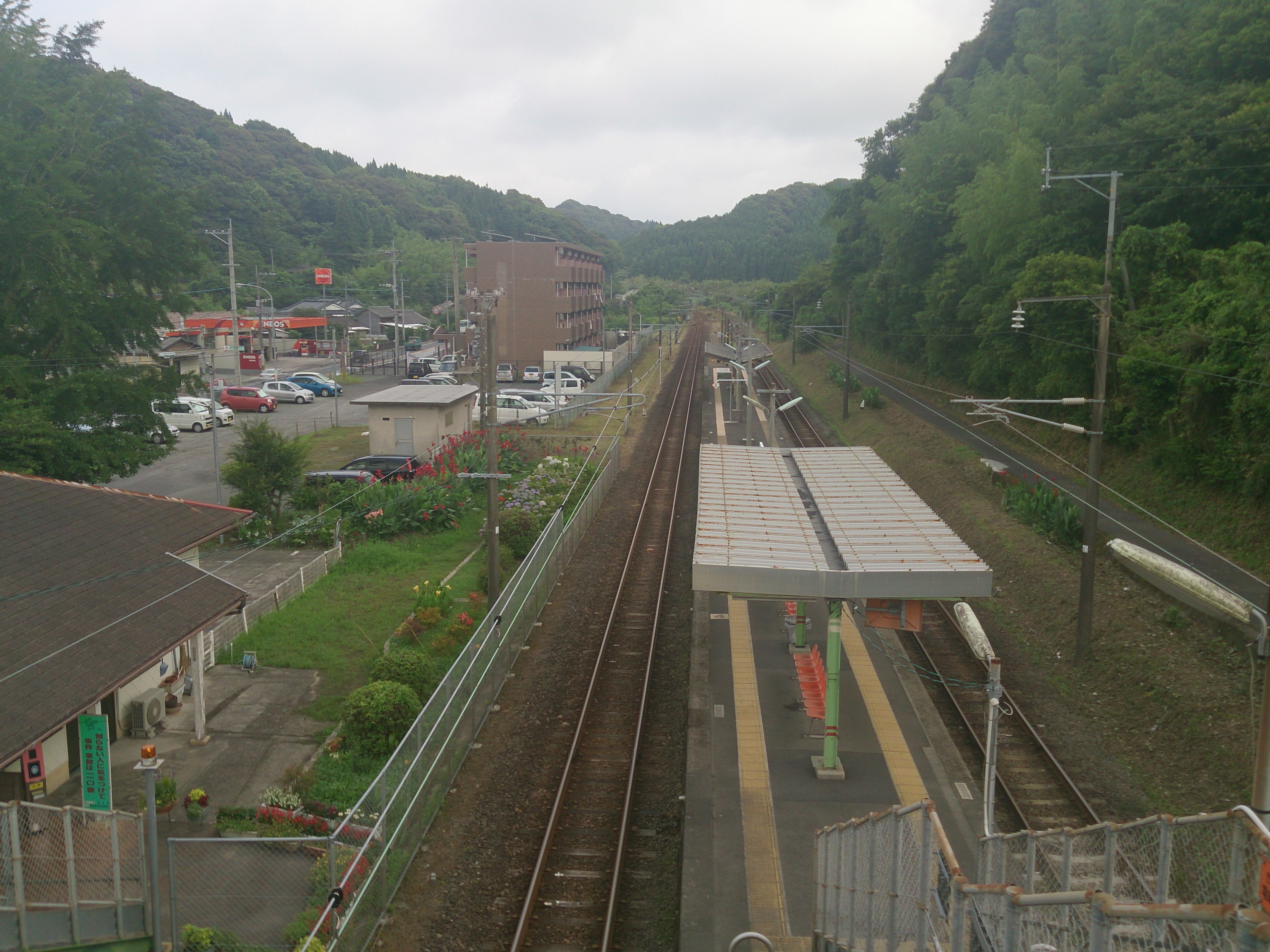 跨線橋から見た東市来駅ホーム